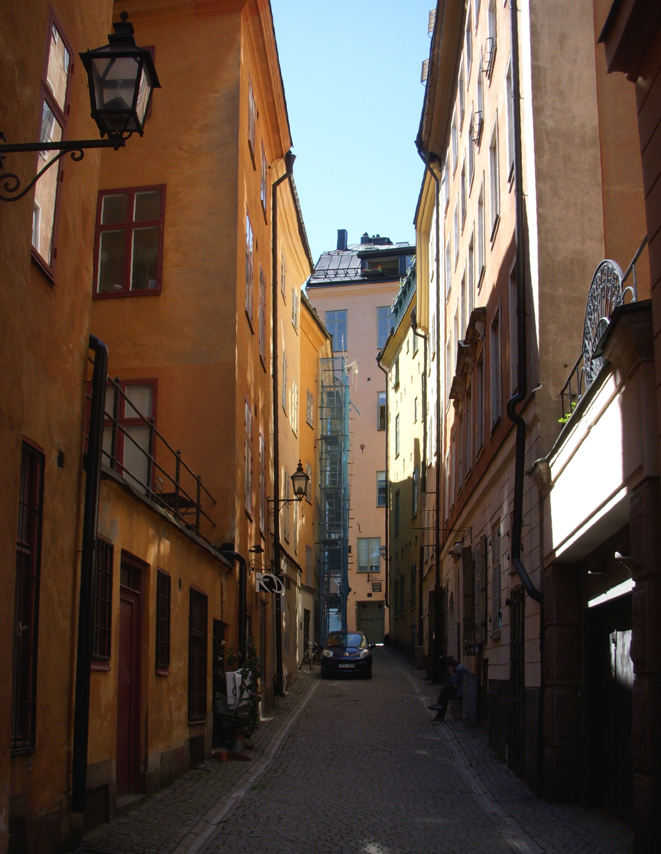 "Skeppar Karls Gränd" i Gamla stan, Stockholm (kvarteret Bootes till höger)